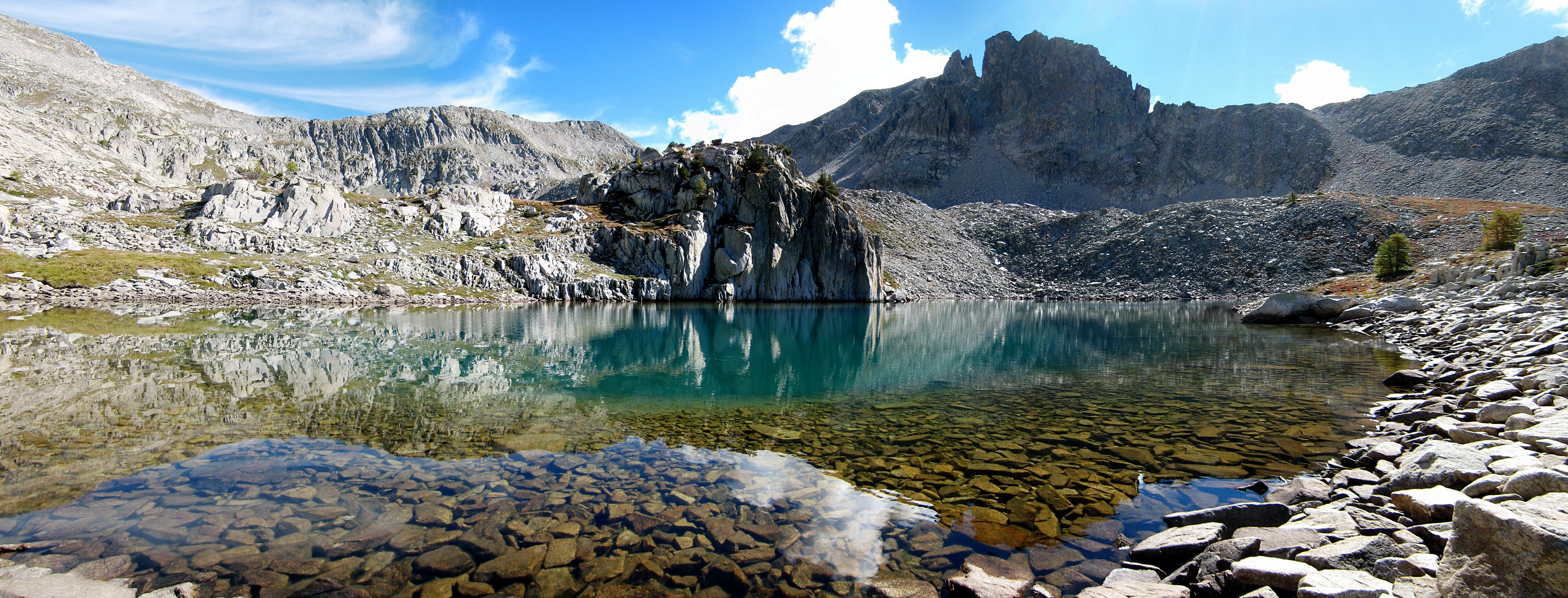 Lac de Frémamorte